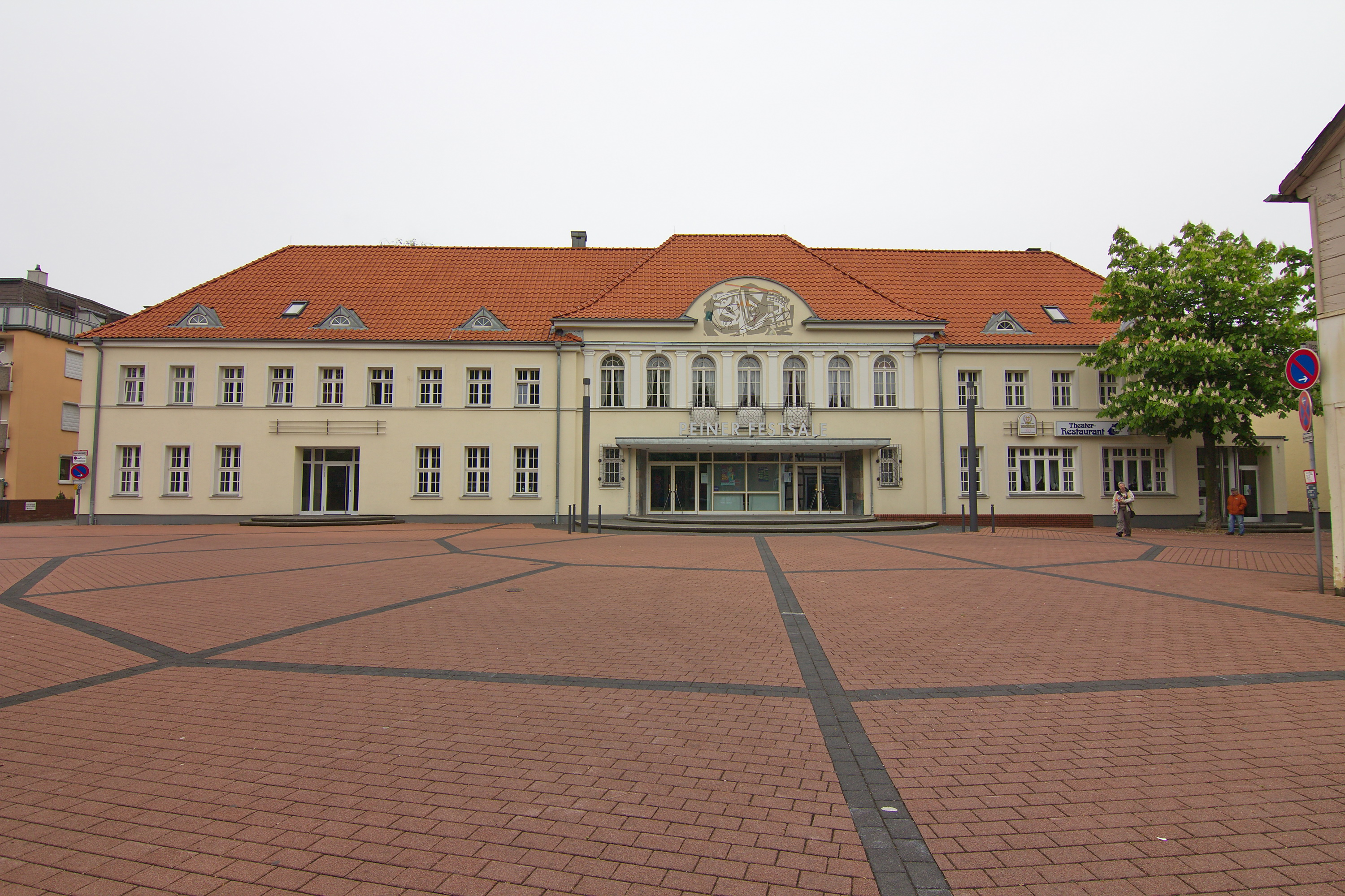 Stadttheater "Peiner Festsäle" am Friedrich-Ebert-Platz in Peine, Niedersachsen, Deutschland.